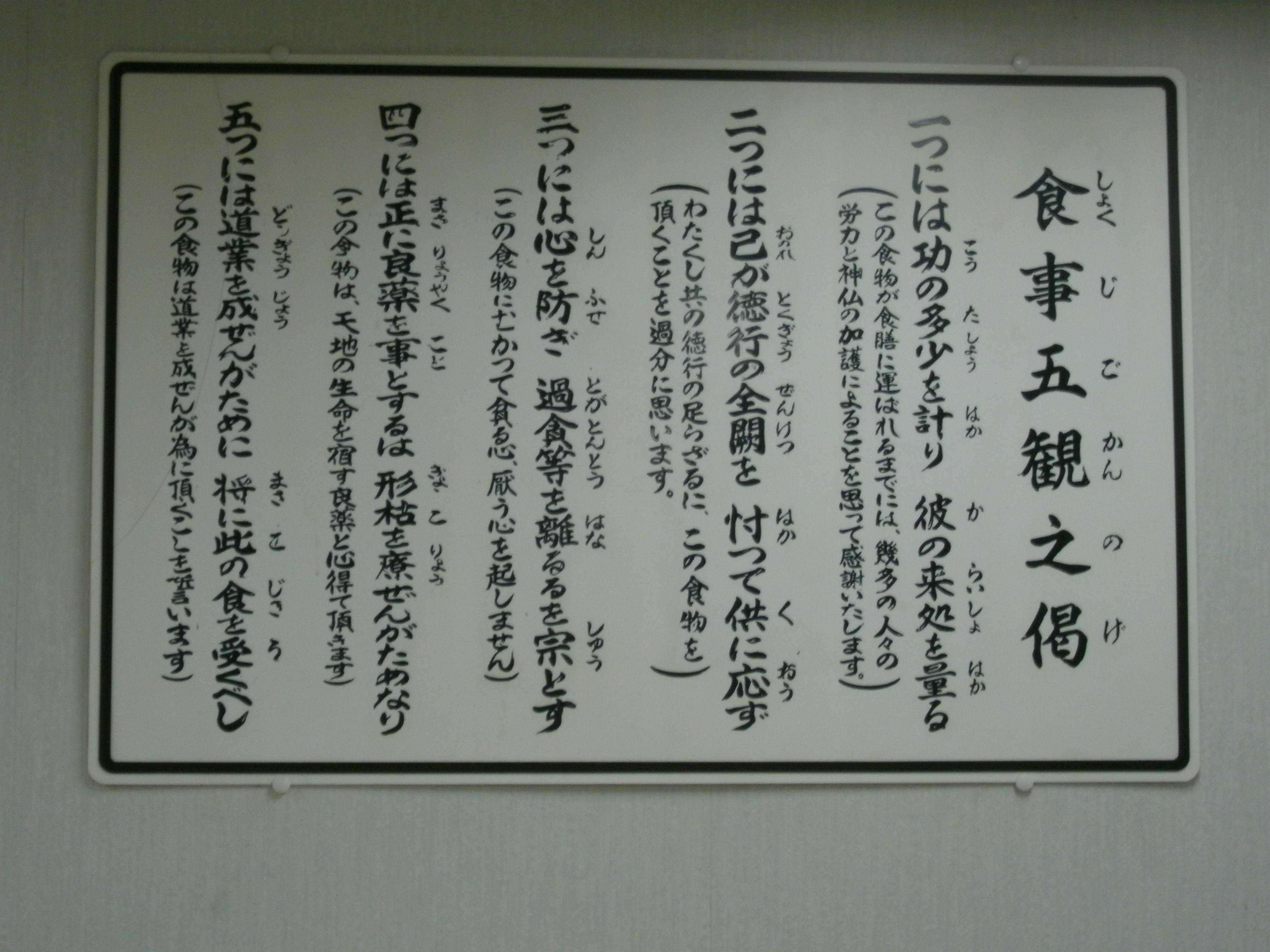 食事五観の偈 花園大学食堂にて撮影